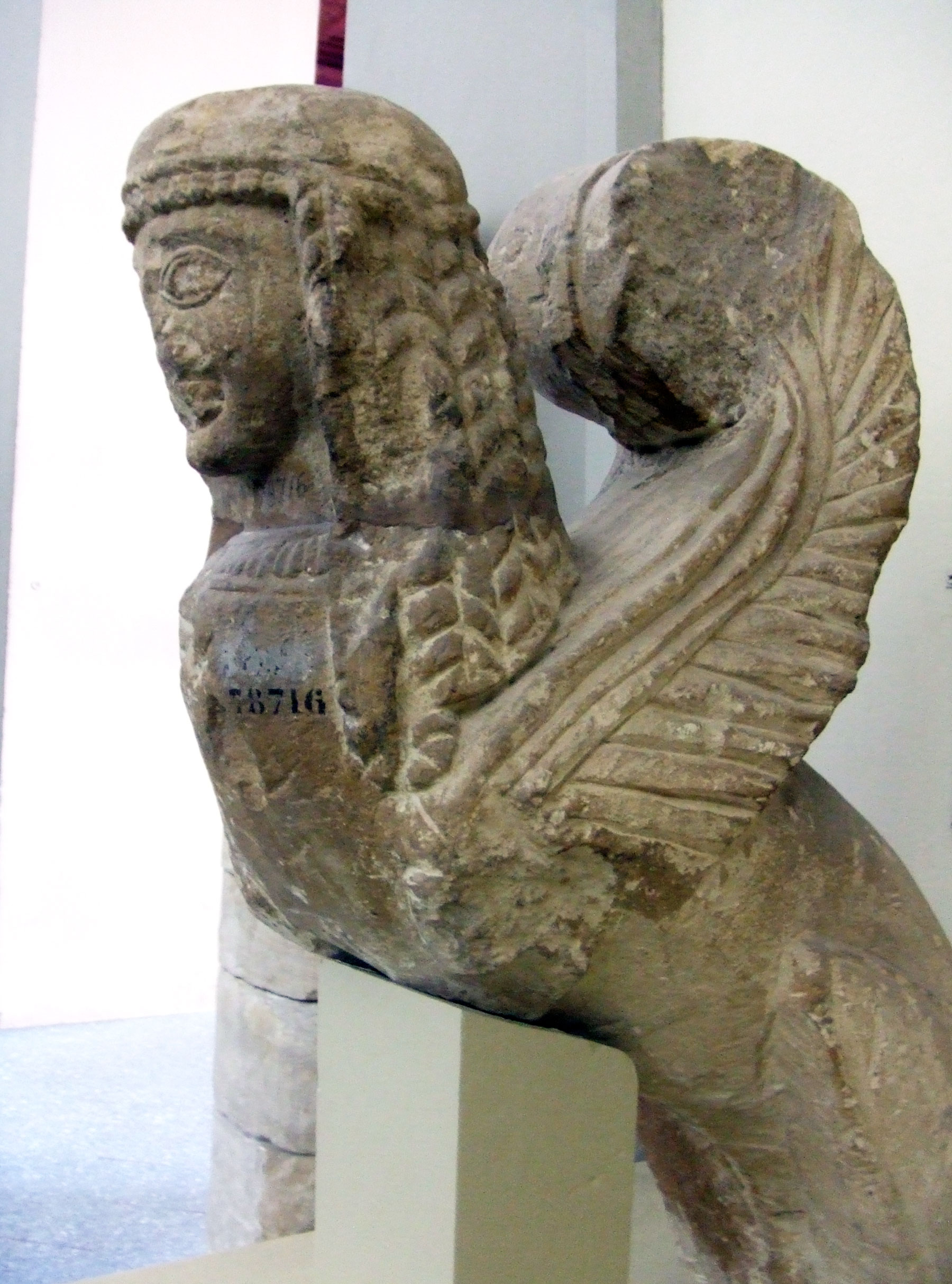 Exemplaire de Sphinge de Chiusi du musée archéologique national de Florence